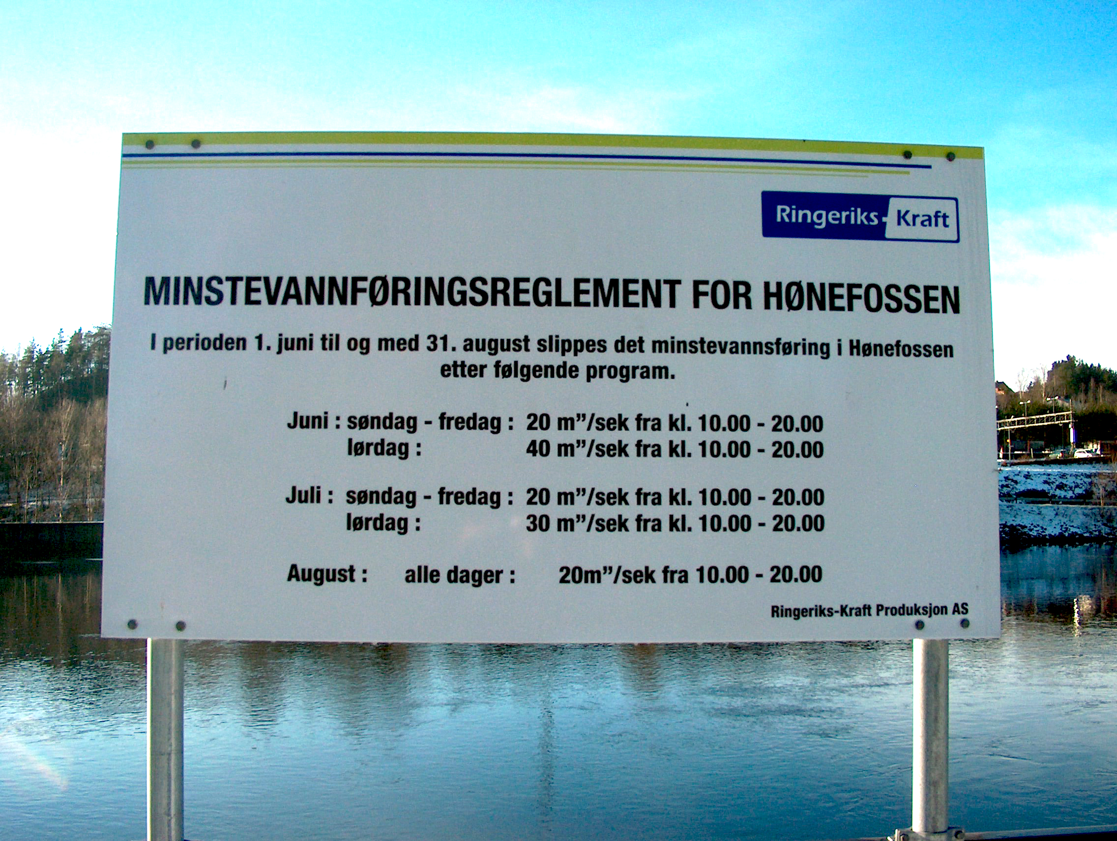 Vannføring i Hønefossen